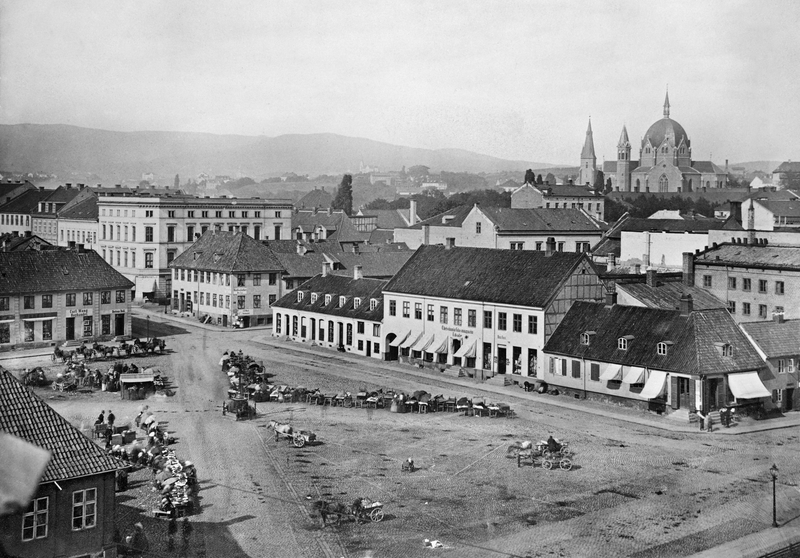 Stortorvet fotografert i 1865, ukjent fotograf. Bildet tilhører Oslo Museum